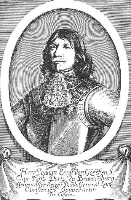 Joachim Ernst von Görzke (auch Görtzke; 1611-1682), kurbrandenburgischer Generalleutnant. Kupferstich, Blatt 182x124mm, Bild 171x115mm